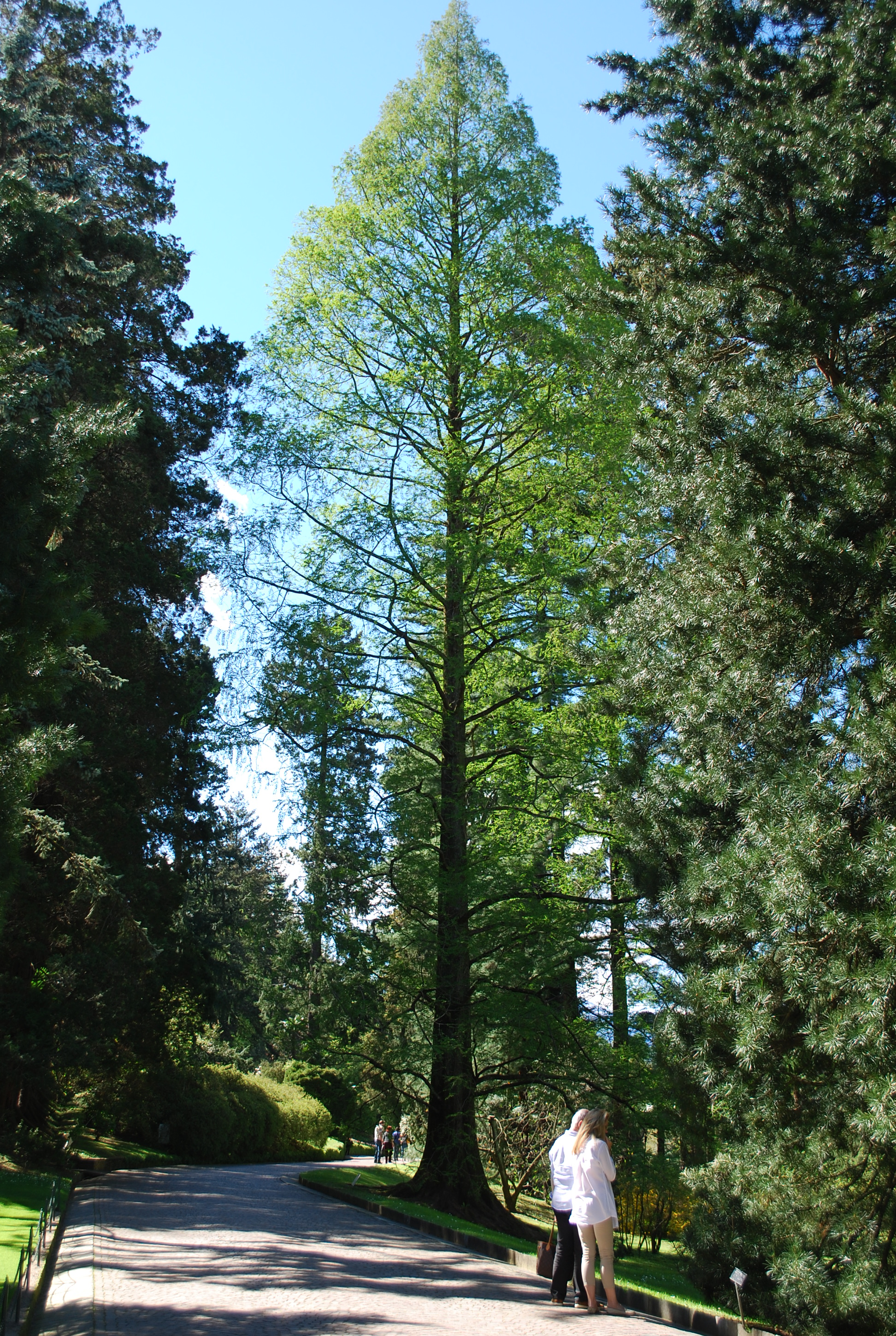 Giardini botanici di Villa Taranto, Verbania - Scorcio sul viale delle conifere all'ingresso del parco, vista sulla Metasequoia glyptostroboides